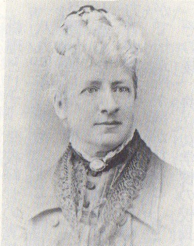 アメリカ合衆国の宣教師ジュリア・ネルソン・クロスビー